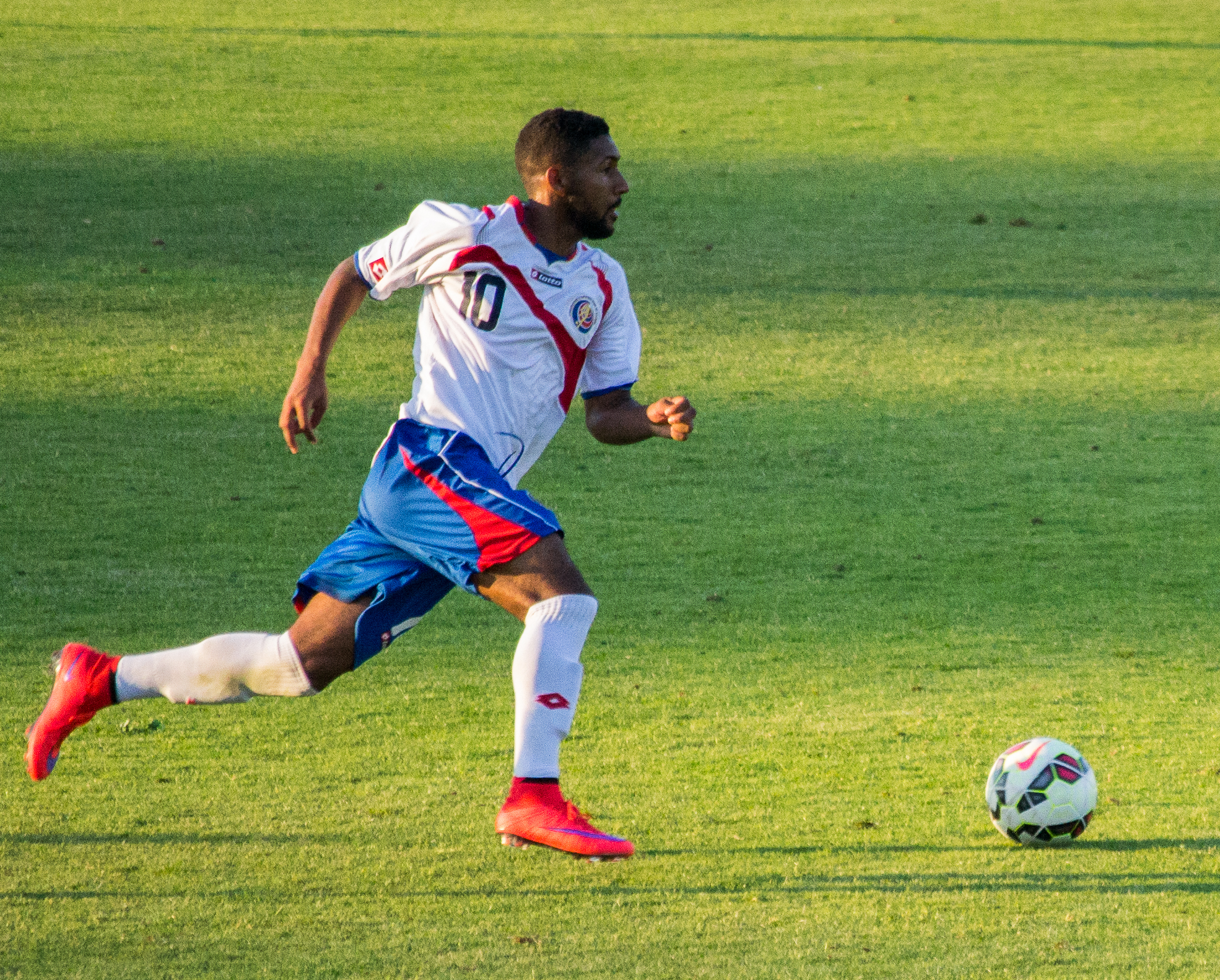 Dylan Flores, Enzo Crivelli